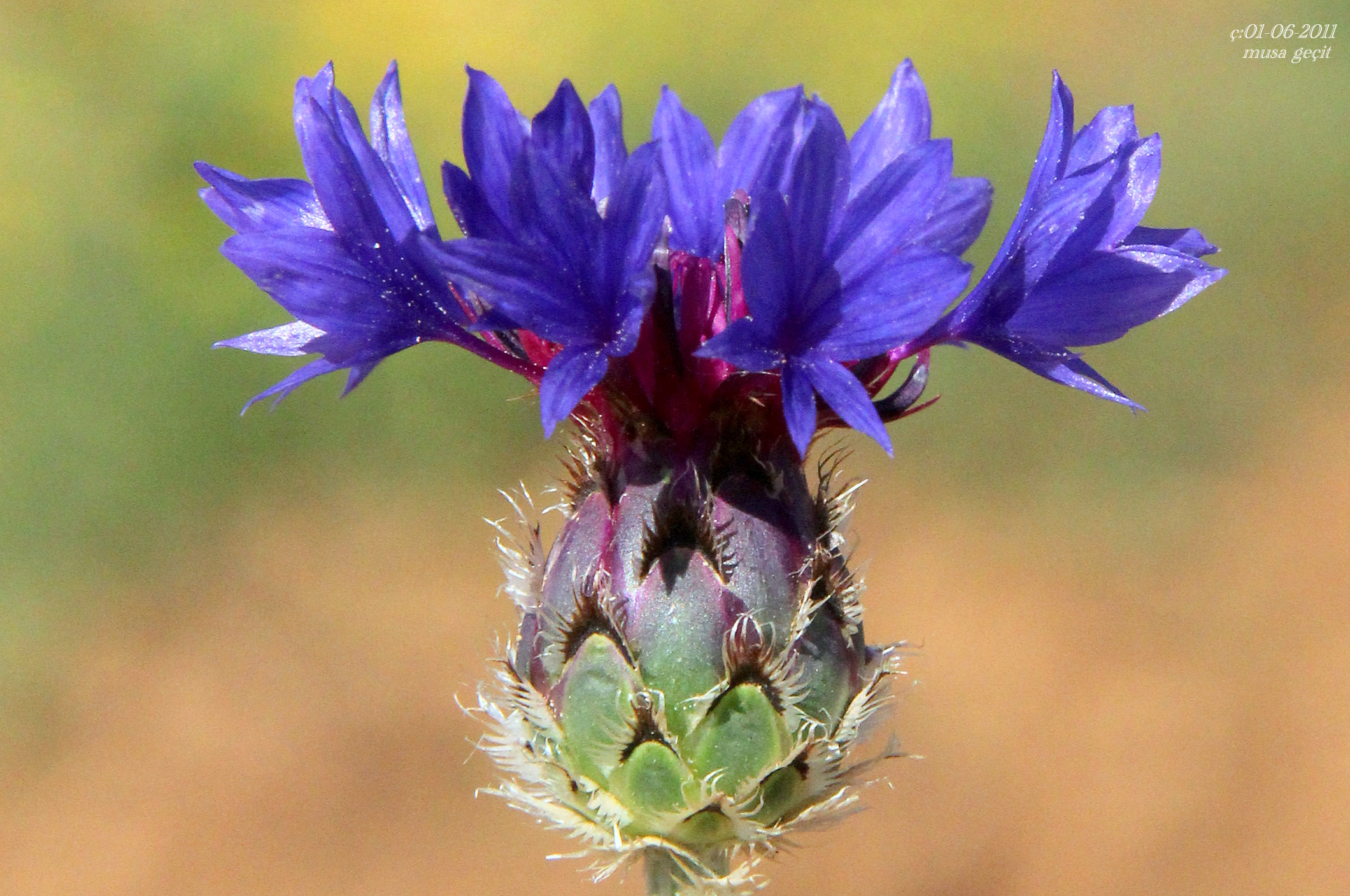 Yer: Mardin Centaurea depressa